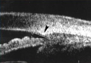 Visualisation de la région cornéo-irido-ciliaire par UBM (50 MHz), avec mise en évidence de l'éperon scléral (flèche) qui apparaît echogène par rapport au corps ciliaire. Il est possible de mesurer l'ouverture de l'angle.